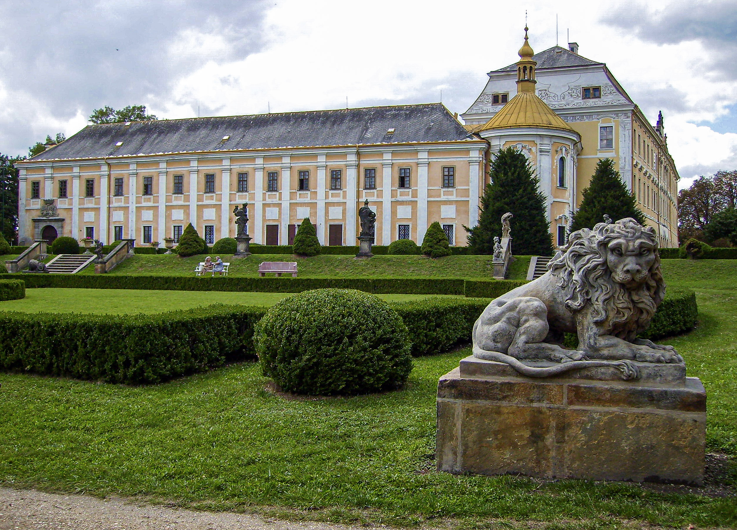 Zamek ve stredoceske Lyse nad Labem (pohled ze zameckeho parku) Autor: Petr Vilgus